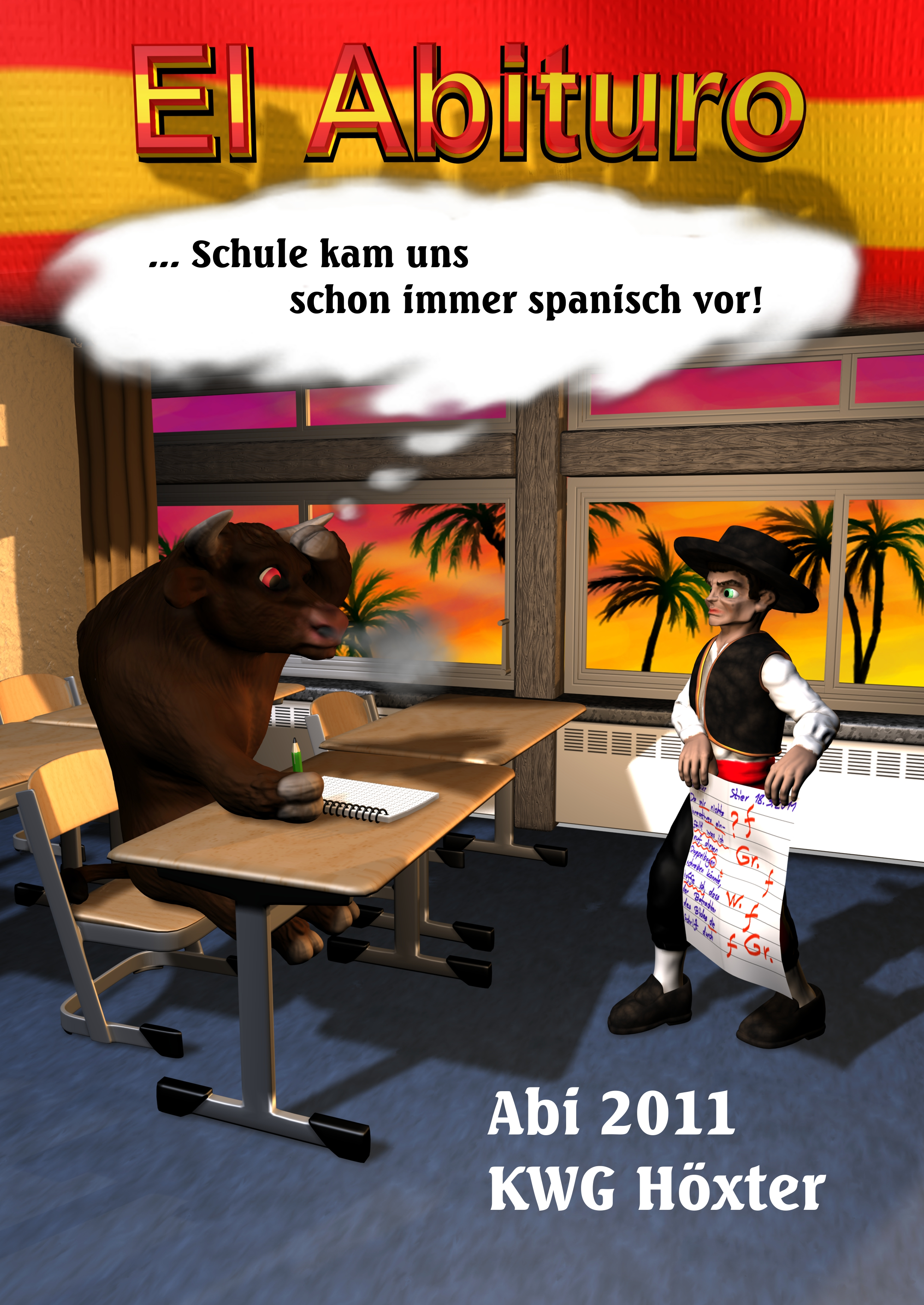 Cover der Abiturzeitung König-Wilhelm-Gymnasium Höxter 2011